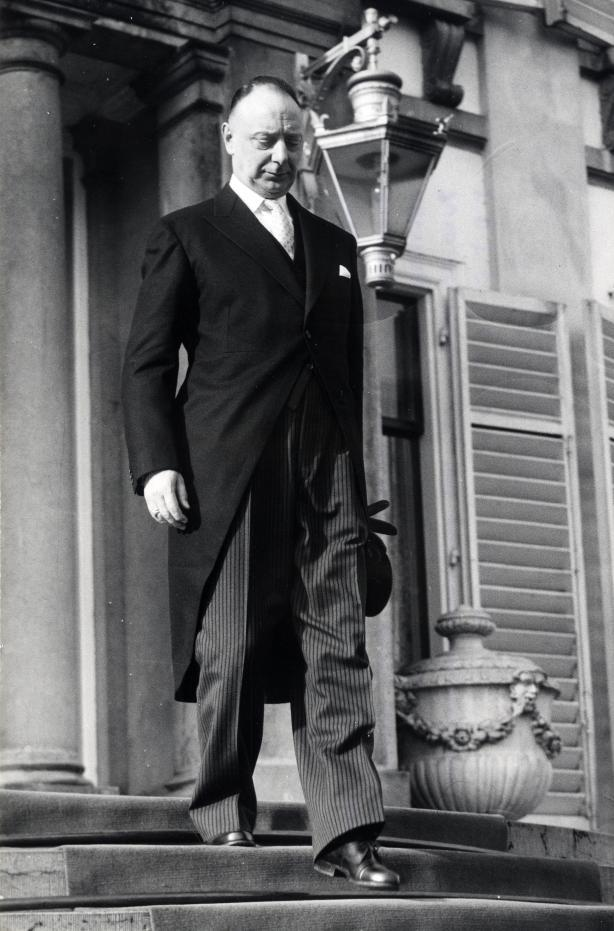 Helders, G.P. (CHU). Ontvangst op Paleis Soestdijk van de nieuwe Minister voor Zaken Overzee, mr. G.Ph. Helders, voor het afleggen van de eed. Foto: Helders bij het verlaten van het paleis. Nederland, Soest / Baarn, 17 februari 1957.